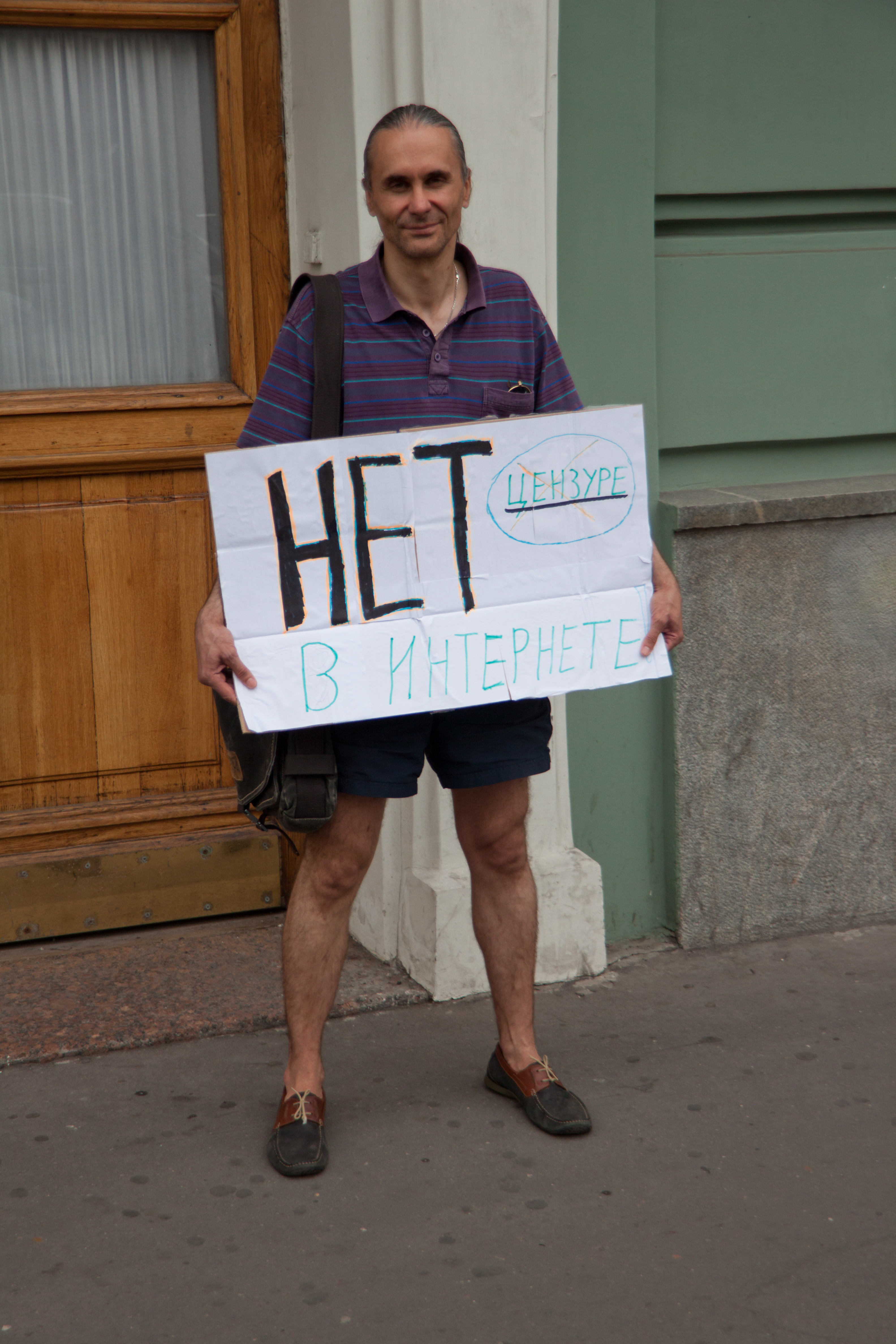 Одиночный пикет у здания Государственной думы в день принятия законопроекта № 89417-6